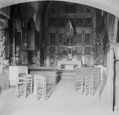 Imatge